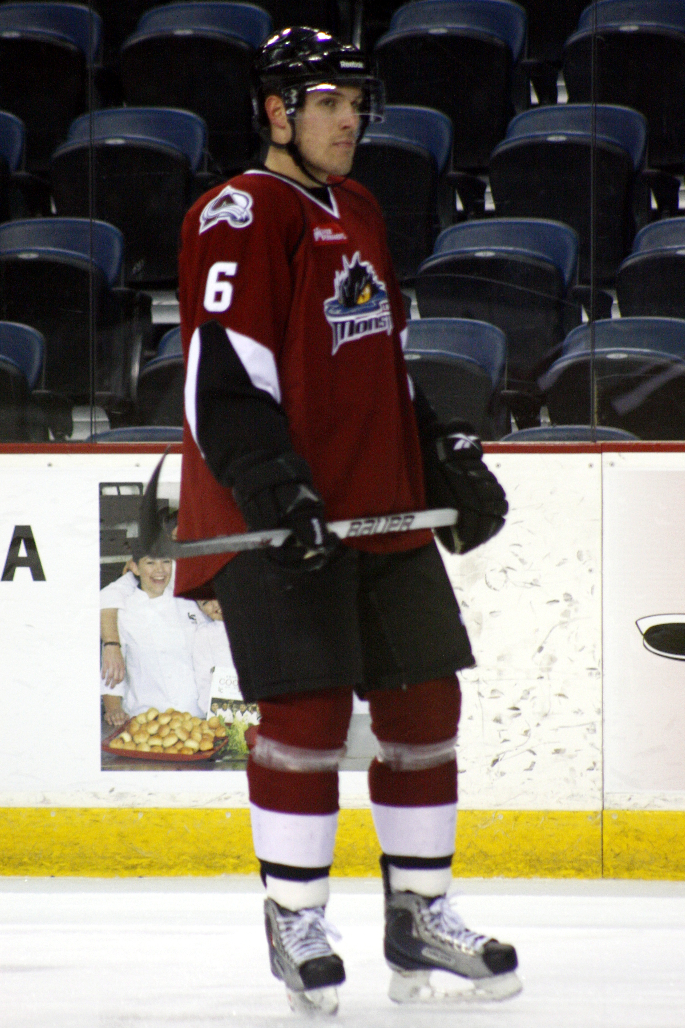 Jonas Holos (2011)